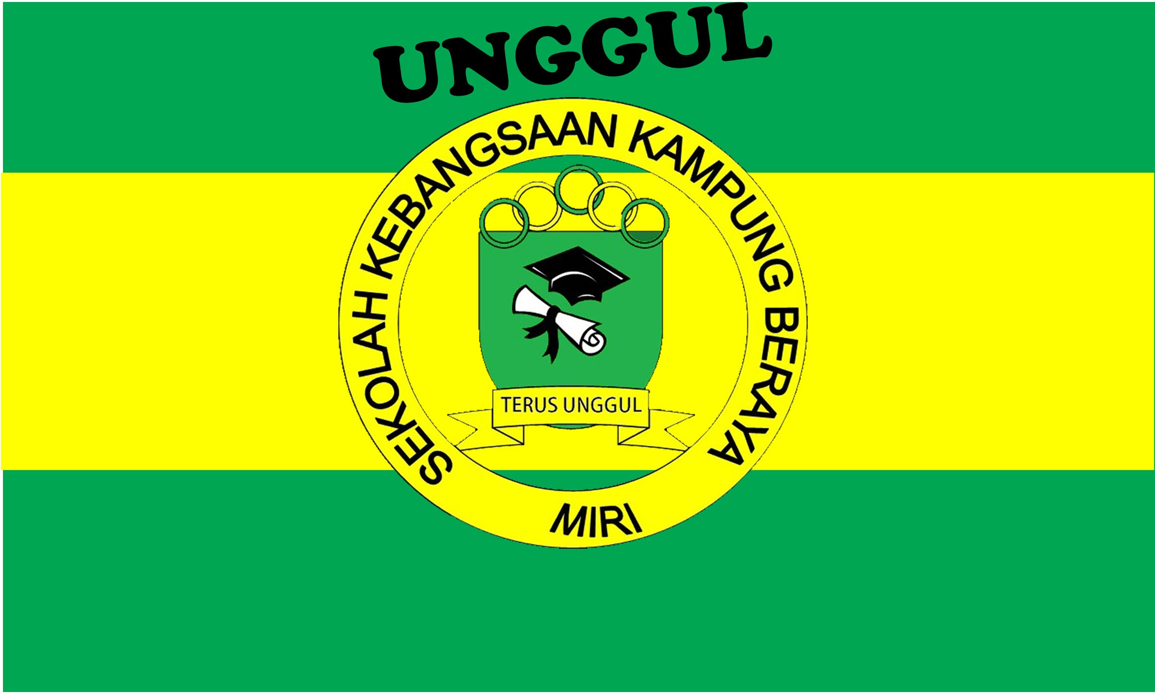 bendera